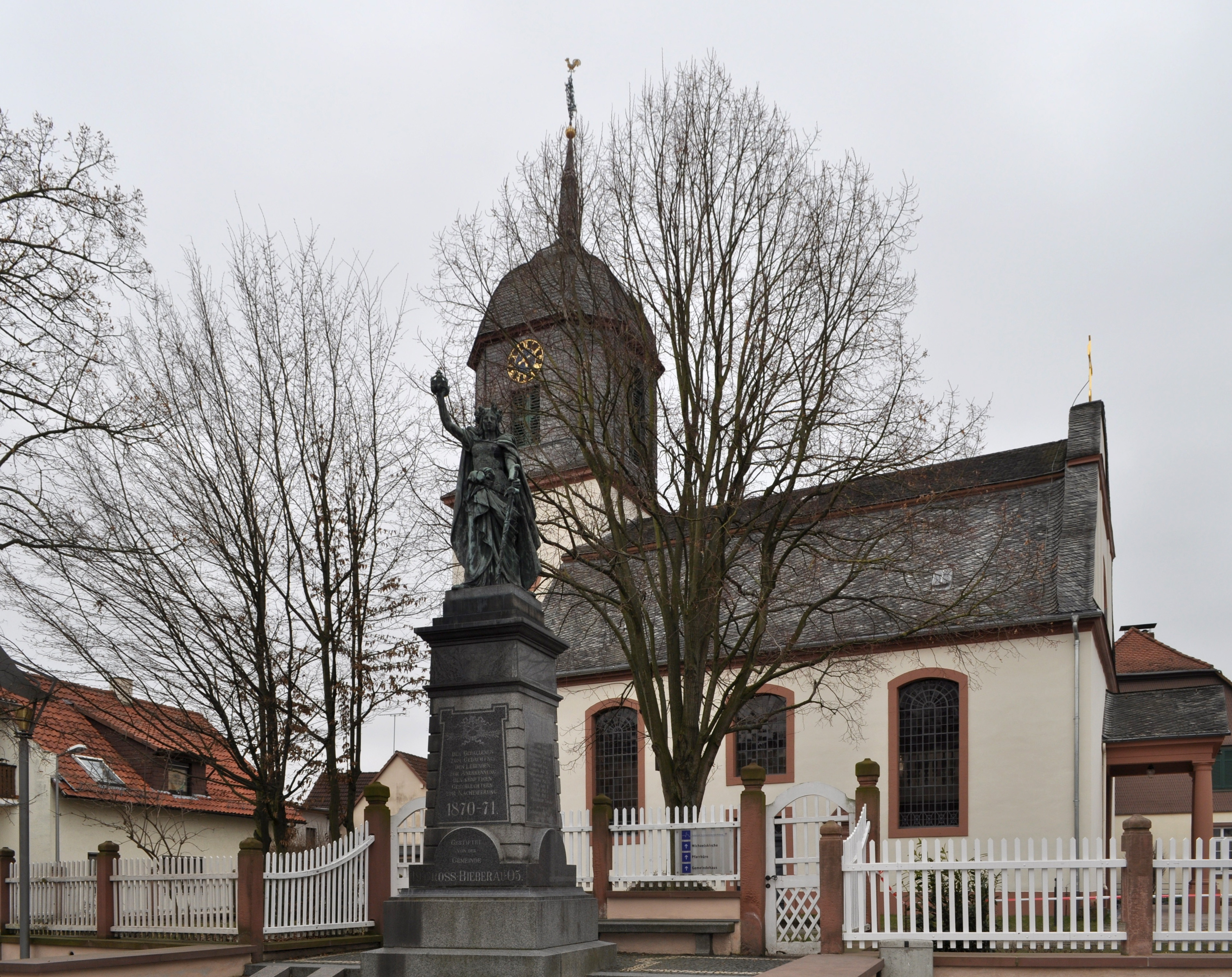 Перед церковью на торговой площади стоит Памятник погибшим в войне 1870\71 гг.